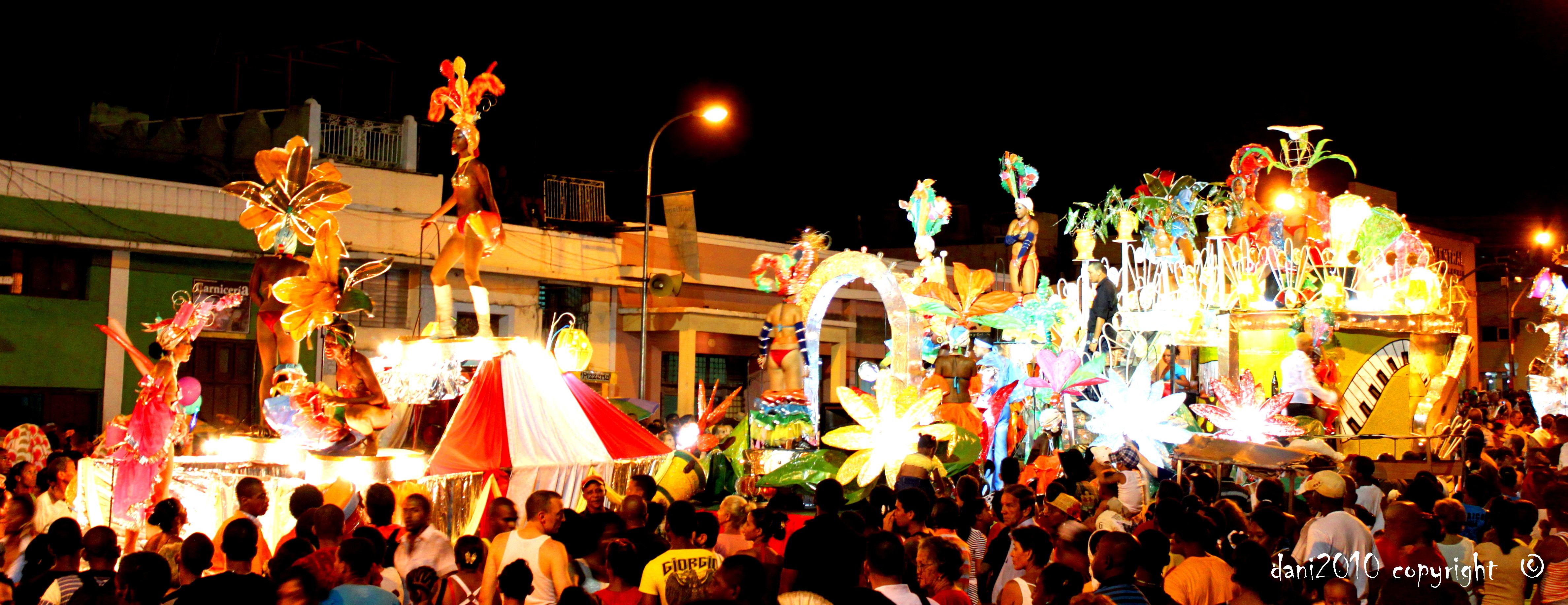 ¡Ahí va Tropicana!